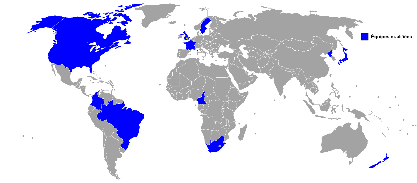 Carte des pays participants au tournoi de football féminin des jeux olympiques 2012.